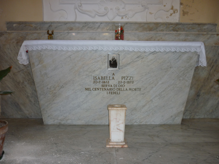 San Giovanni in Fiore - Chiesa Madre, sepolcro della beata Isabella Pizzi